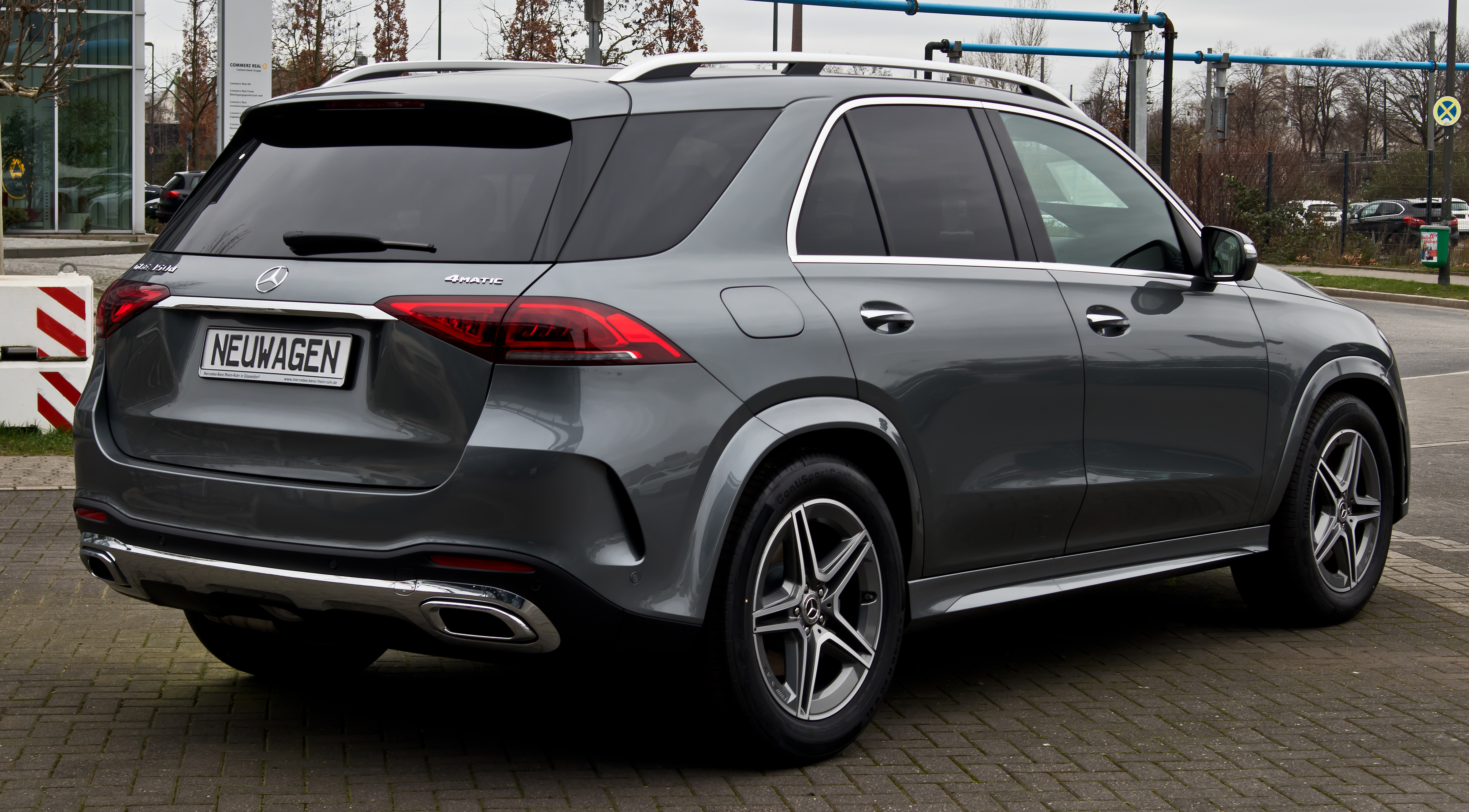 Mercedes-Benz GLE 350 d 4MATIC AMG Line (V 167)